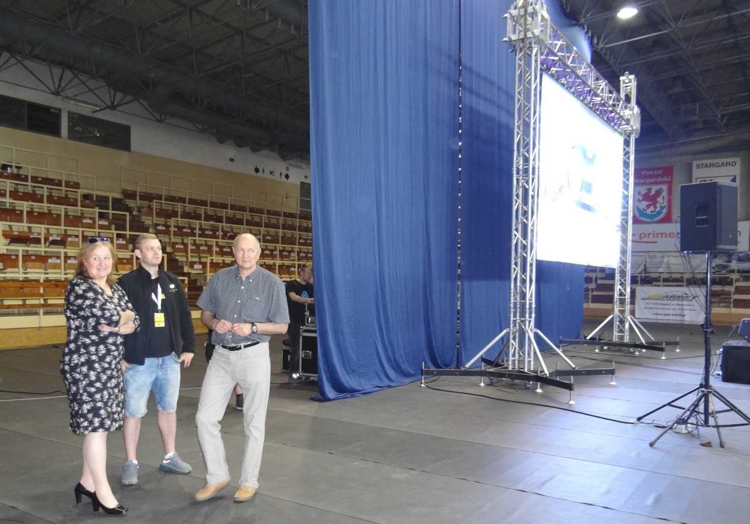 Prezes Spójni Tadeusz Gutowski (17.05.2018)